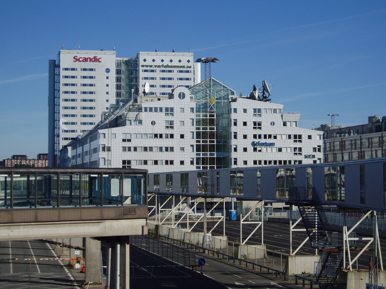 Scandic Hotel Ariadne vid Värtahamnen